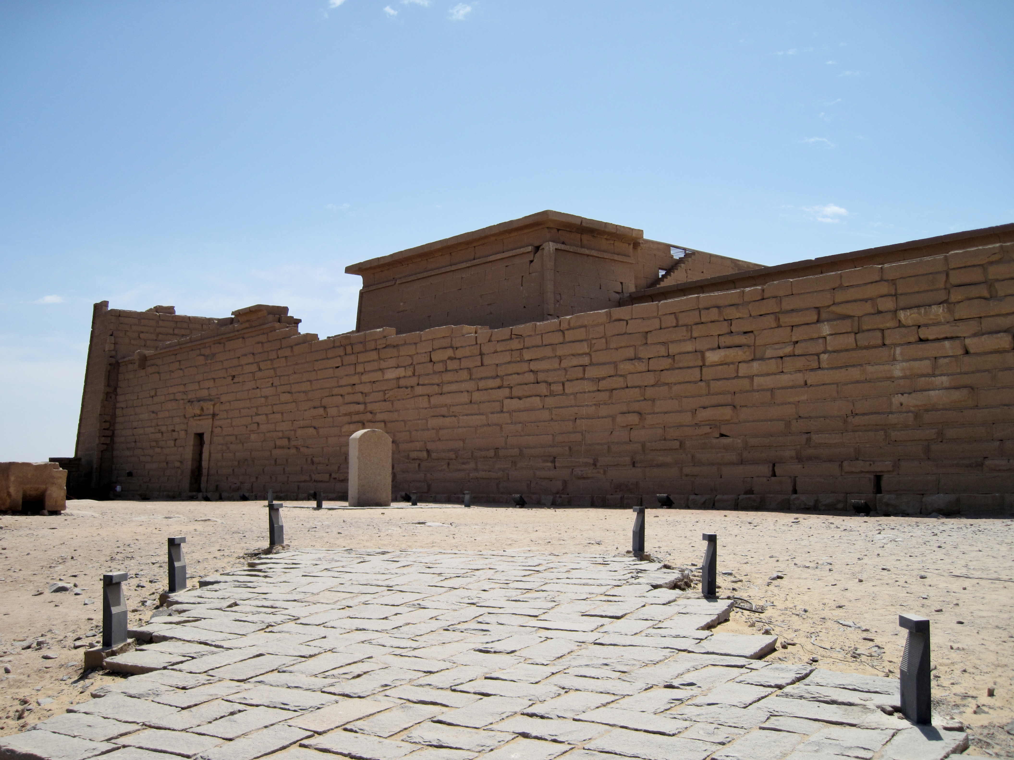 Nordseite des Mandulis-Tempels auf der Insel Neu-Kalabscha im Nassersee, Ägypten